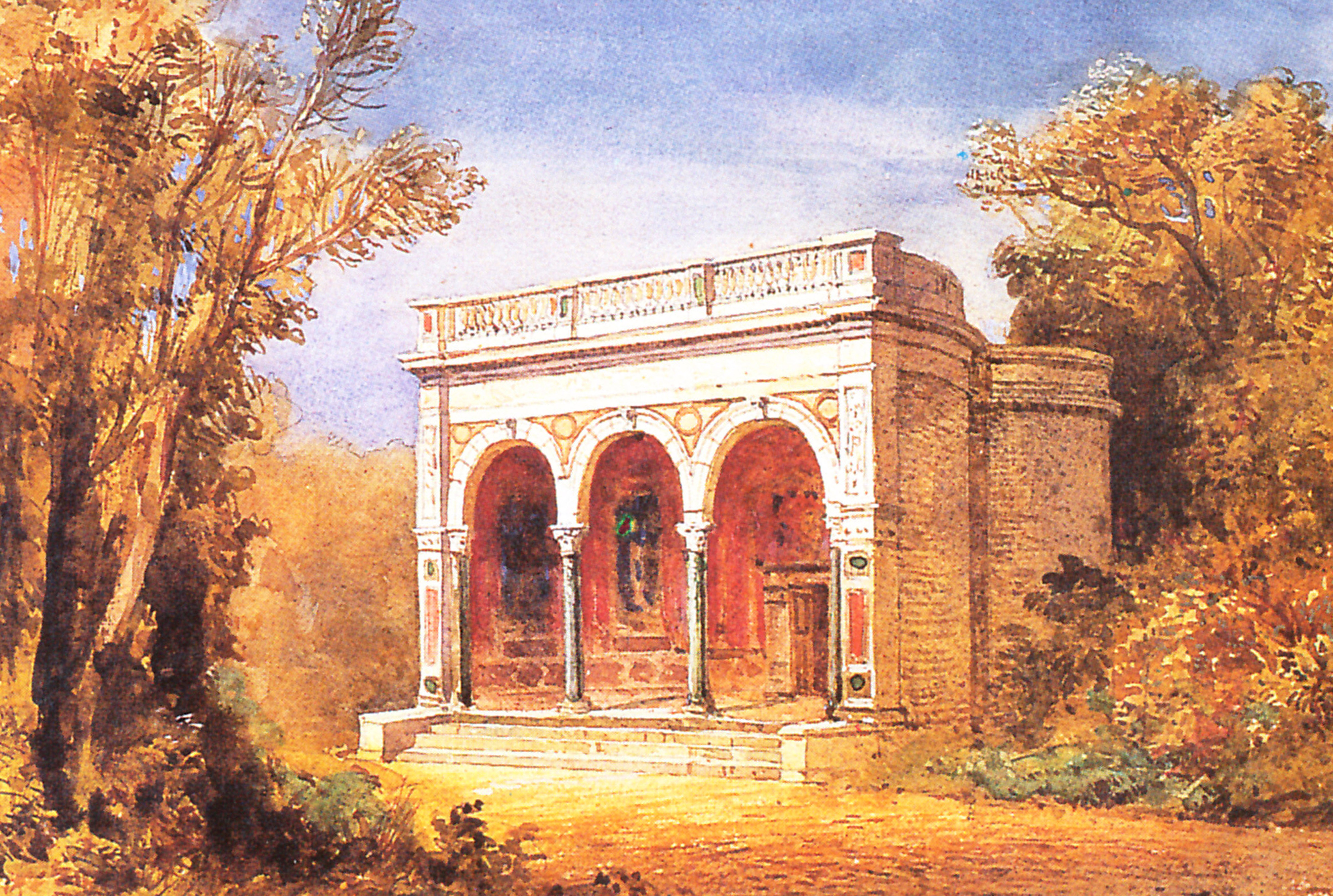 Die Loggia Alexandra im Park Klein-Glienicke, Aquarell von Herrmann Schnee 1874